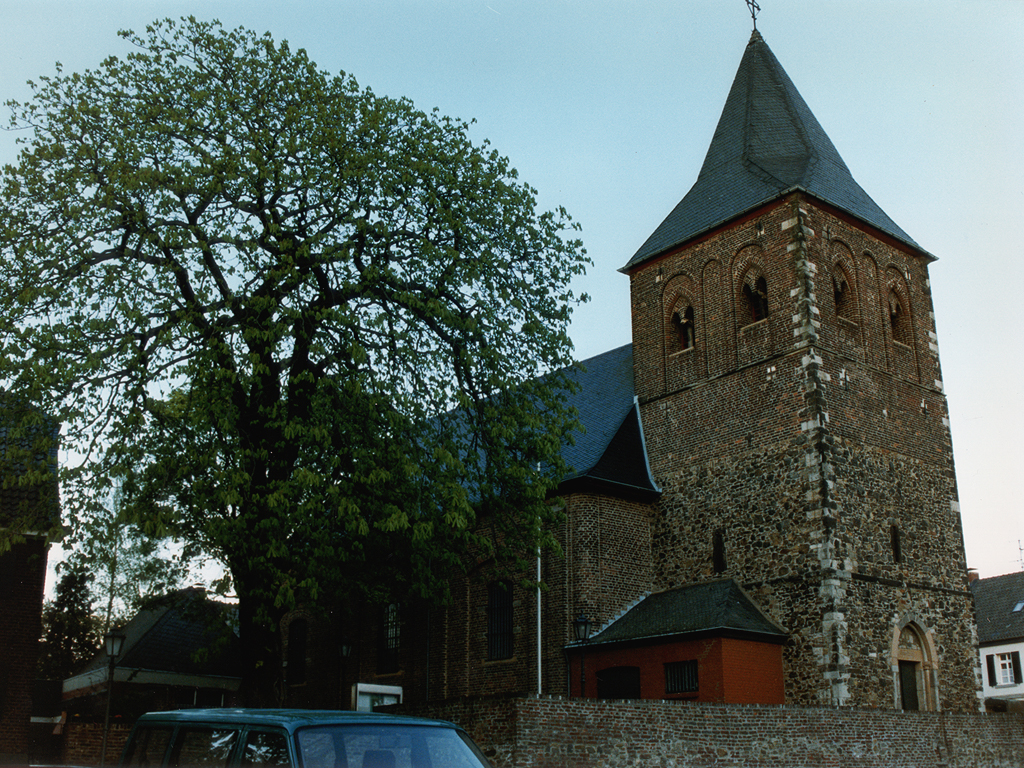 Kirche in Leverkusen Rheindorf